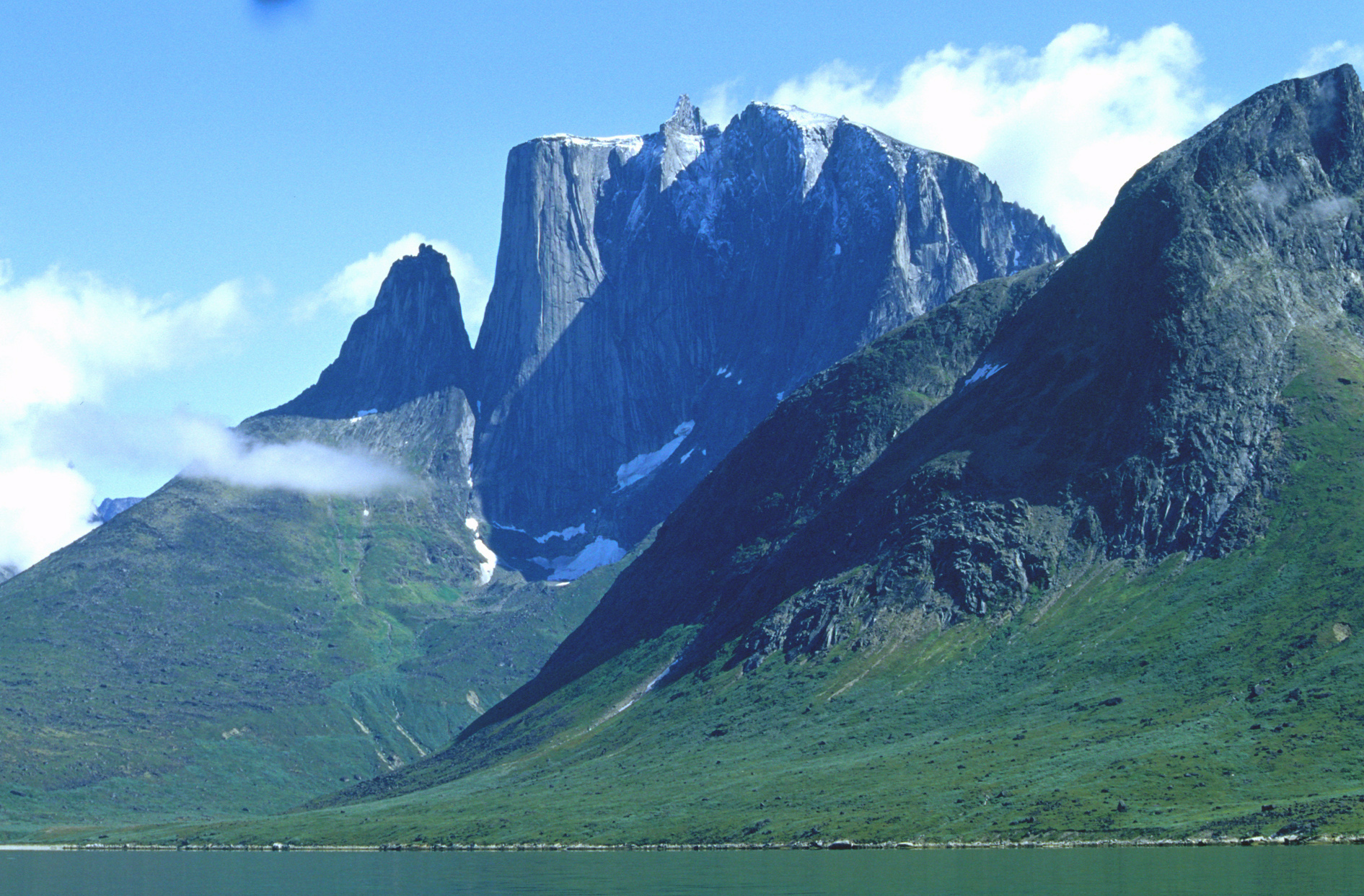 Ulamertorsuaq